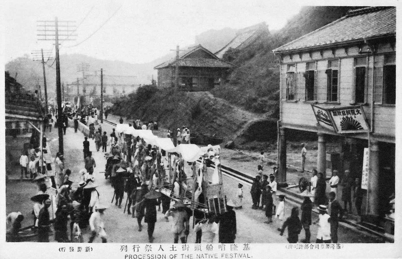 日治時代基隆哨船頭的廟會